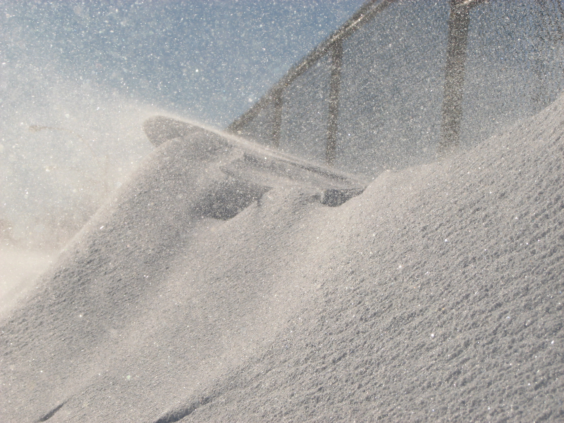 Poudrerie (neige volante) à Montréal